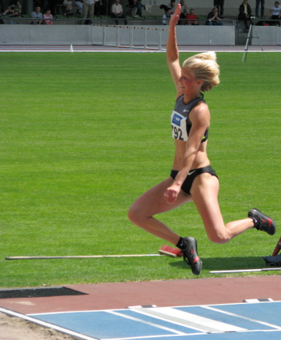 Katja Demut beim Olympia-Qualifikationswettkampf 2012 im Stadion der MTG Mannheim.